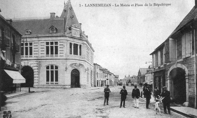 Mairie de Lannemezan (inaugurée en 1911)